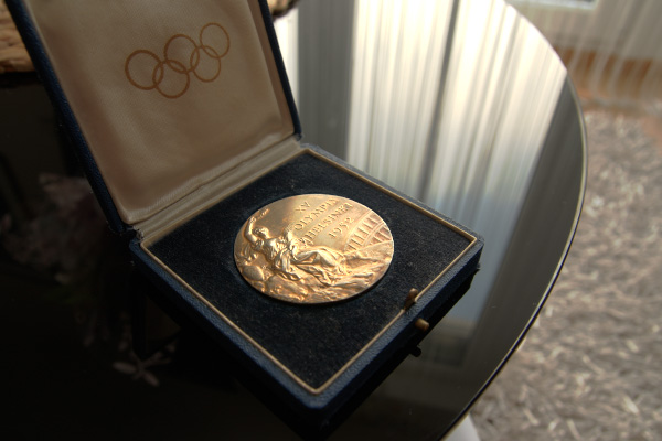 Zlatá medaile, kterou získal kanoista Josef Holeček v roce 1952 na olympiádě v Helsinkách.